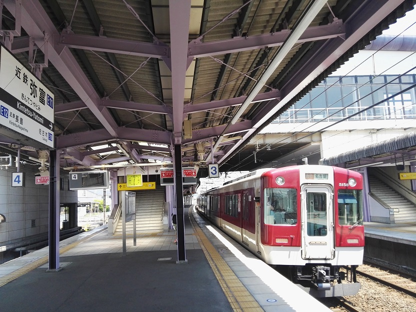 Kintetsu-Yatomi station platform